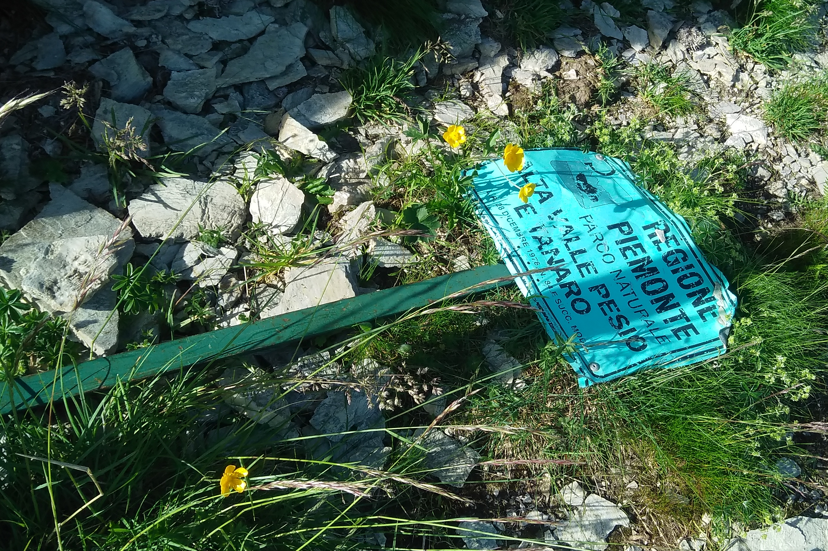 Parco del Marguareis (Alpi LIguri): un cartello con la vecchia denominazione del parco (Parco naturale della Alta Valle Pesio e Tanaro)